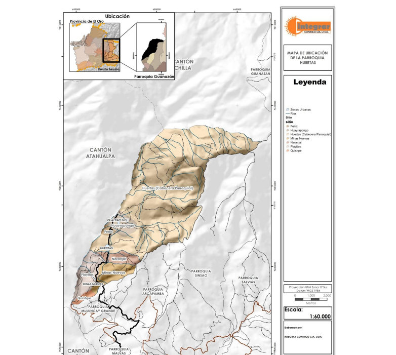 Mapa de Huertas